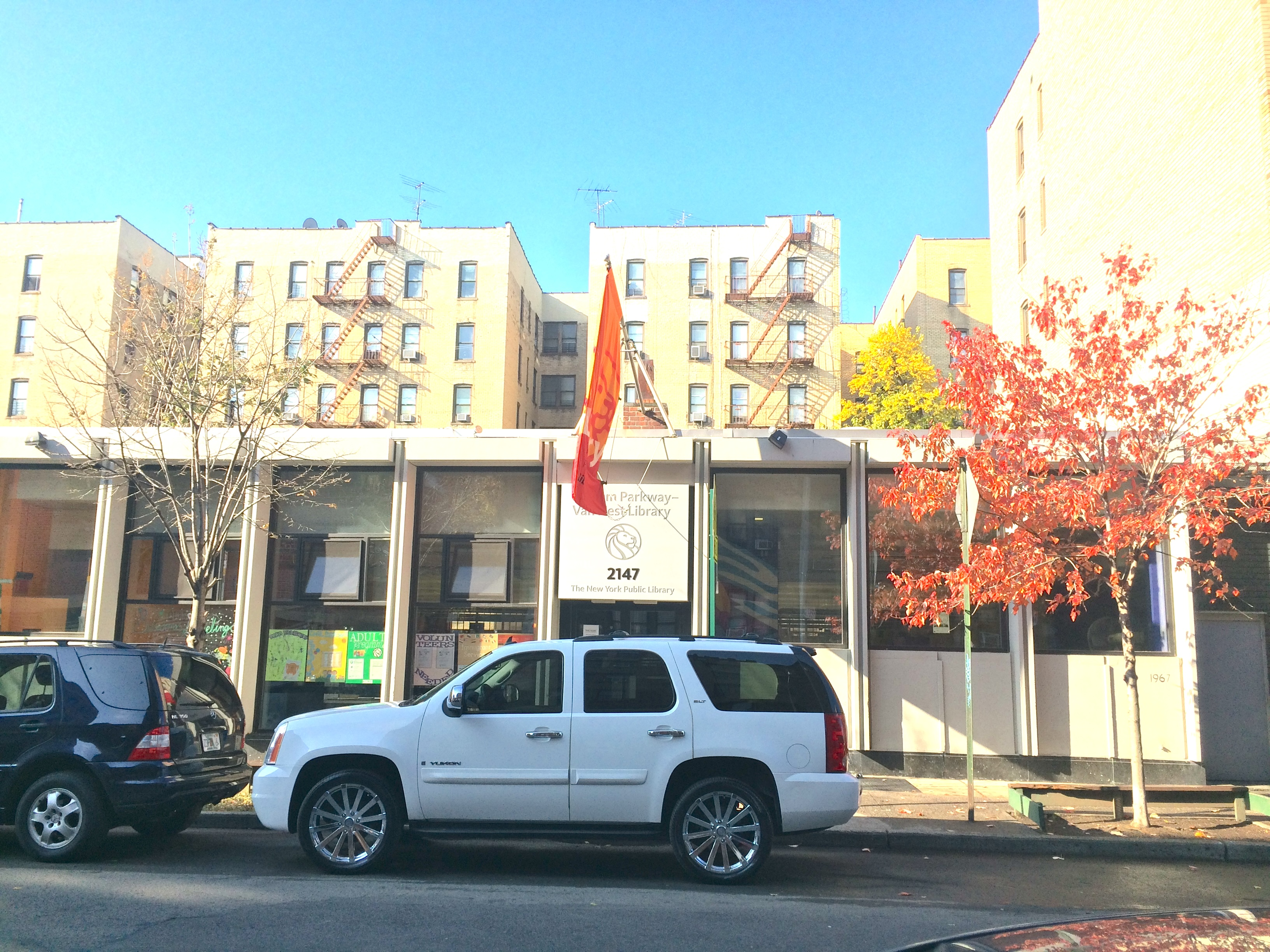 Biblioteca em Van Nest